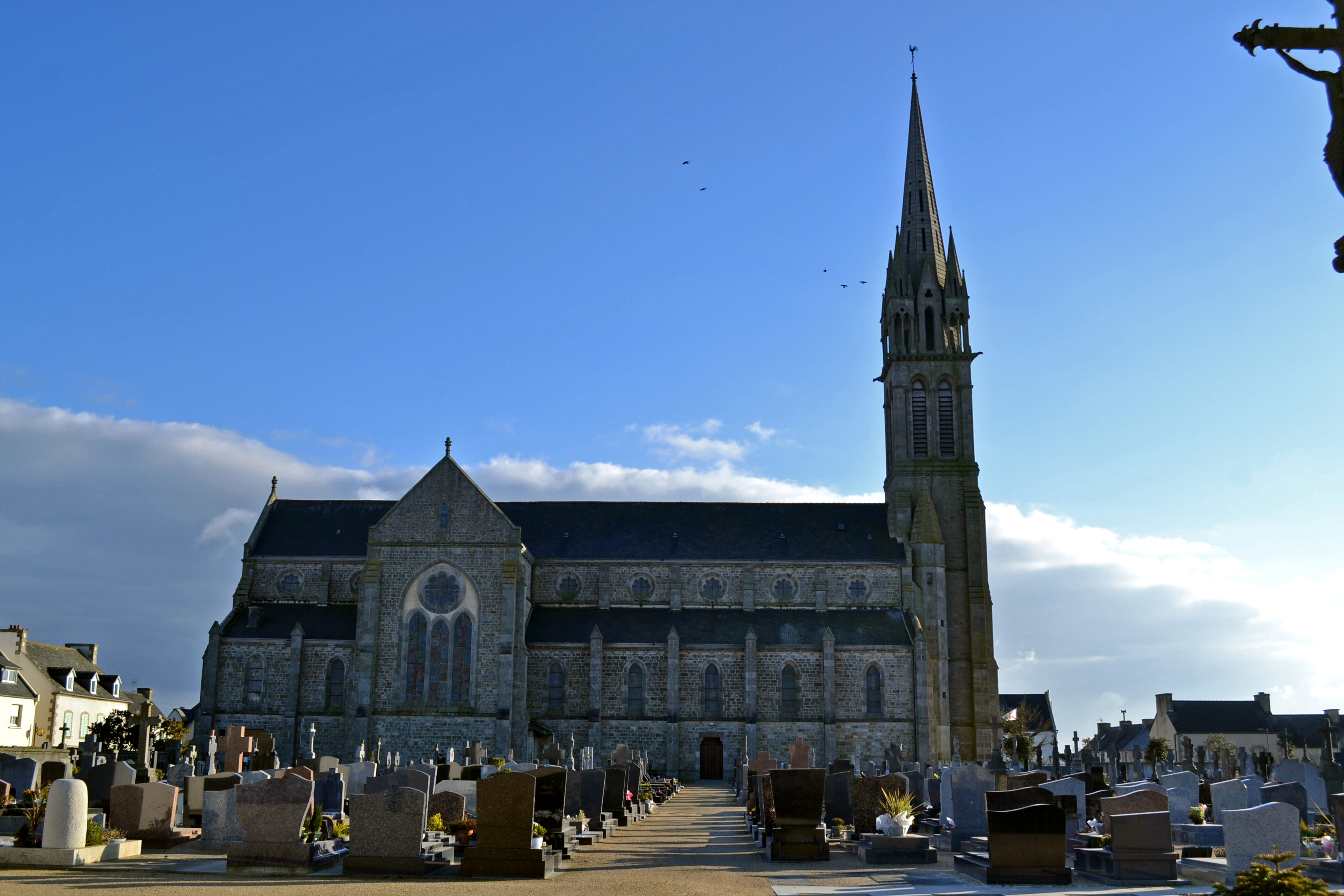 Église Saint-Pierre (1884 - 1893) à Plouénan (Finistère, Bretagne).